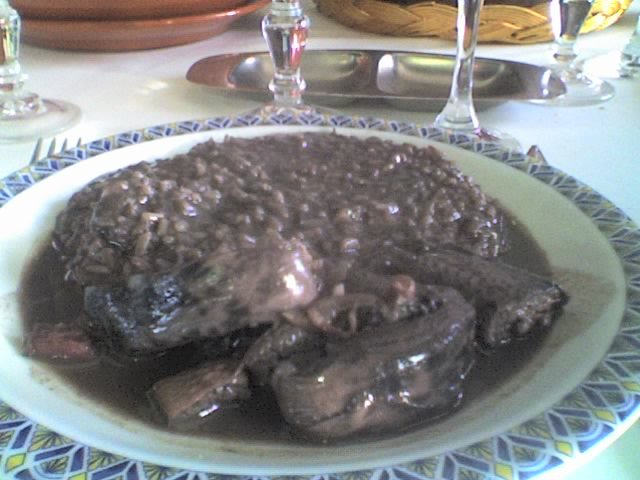 Tradicional Portuguese delicacy - Lamprey rice